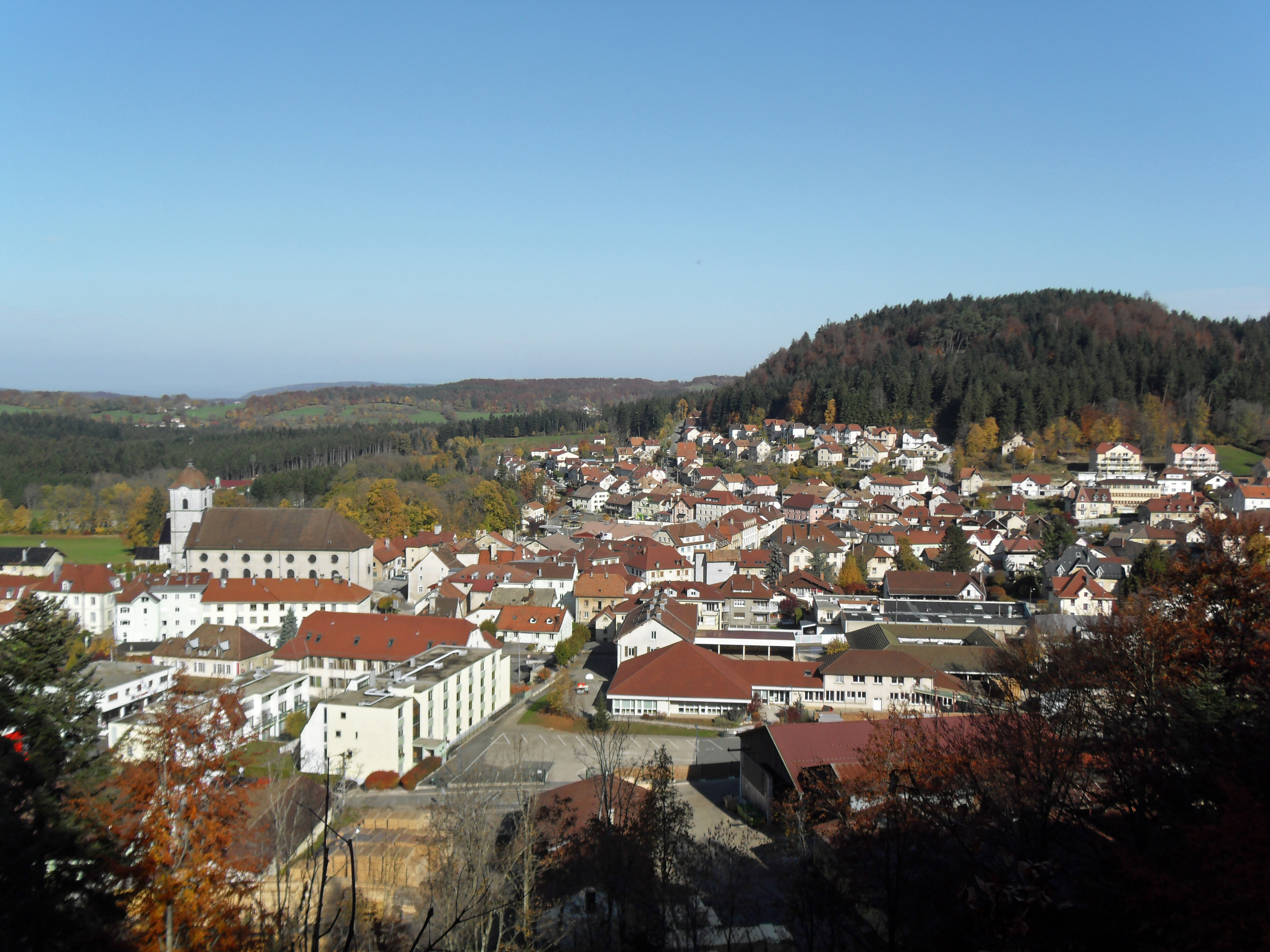 Vue générale de la ville de Maîche, France, en automne.